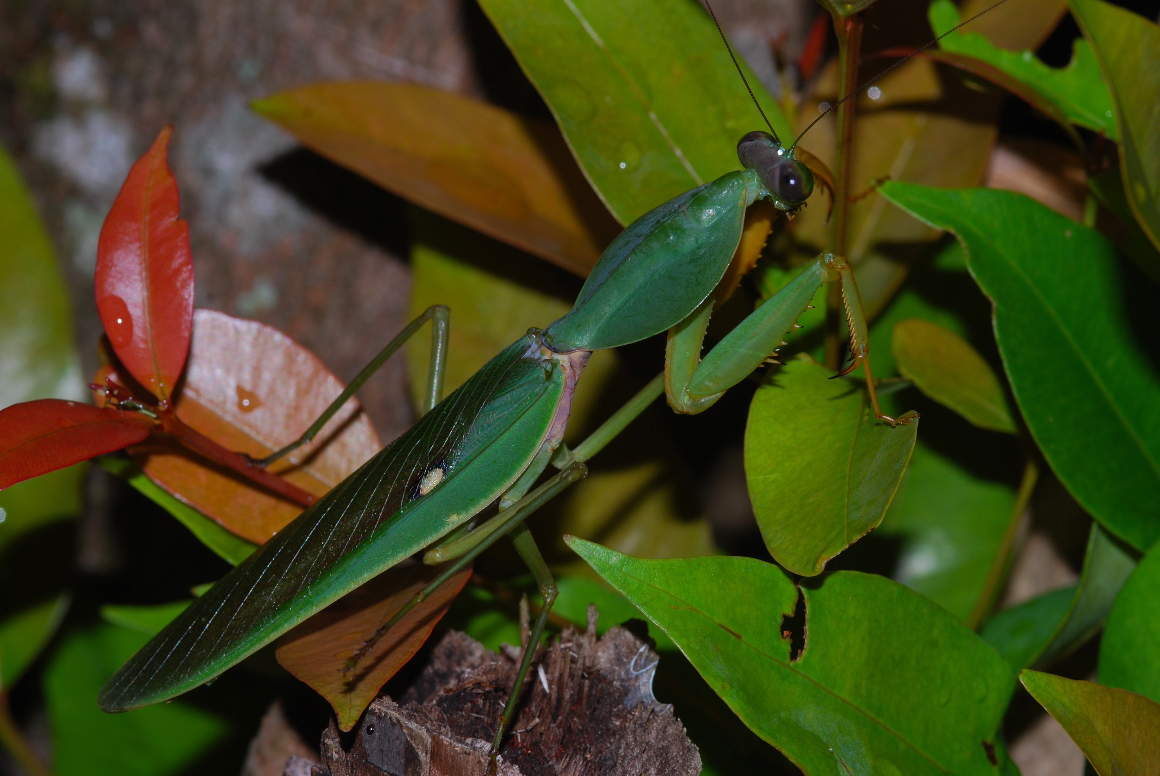 Kuala Tahan, Pahang, MALAYSIA